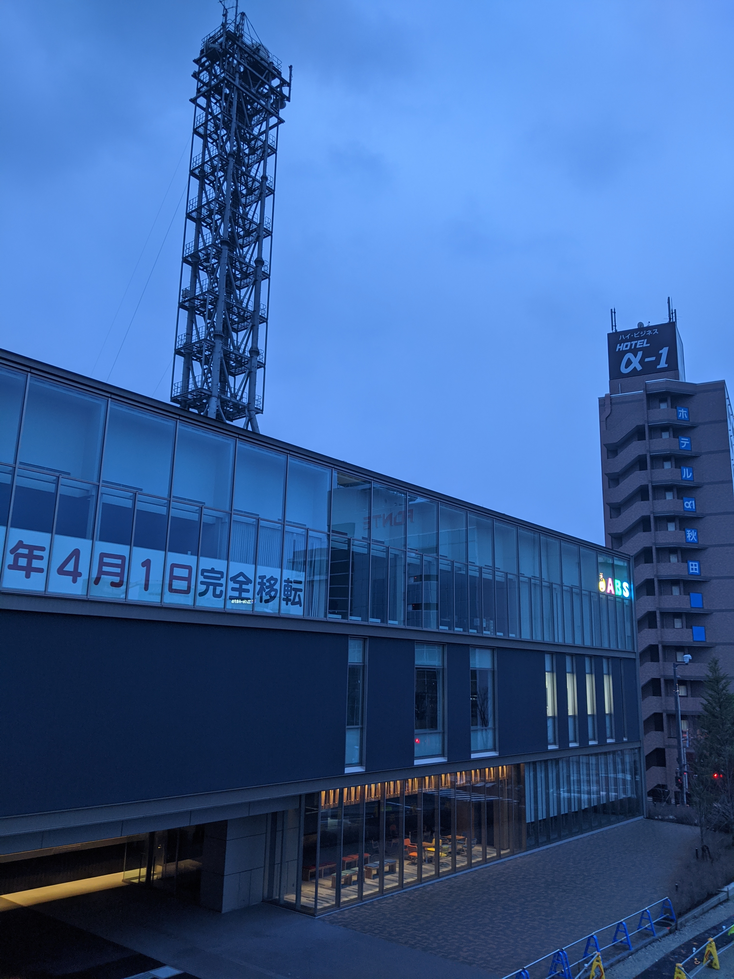 2020年以降の、秋田放送の社屋